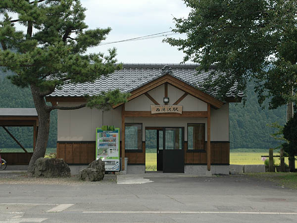 Nishi Takizawa Station, on Yuri Kōgen Railway, Yurihonjō, Akita, Japan